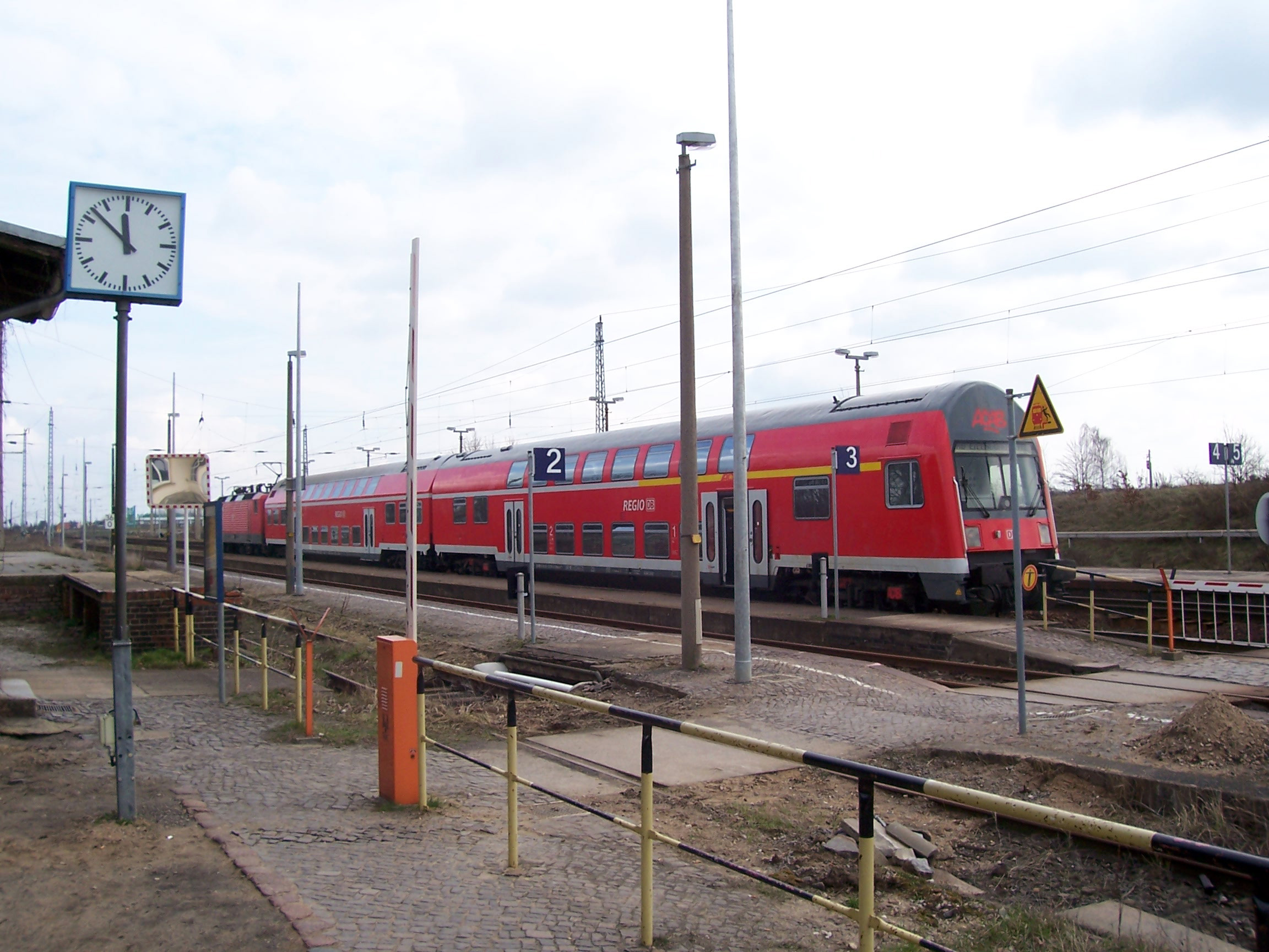 RB 115 von Leipzig Hauptbahnhof auf Gleis drei im Bahnhof Eilenburg-Ost.